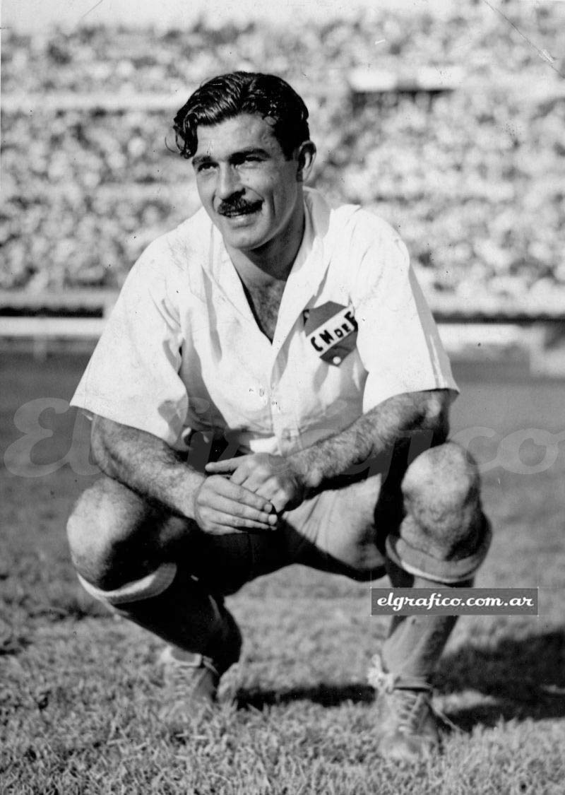 Argentine football player Atilio García, posing during his tenure on Nacional.